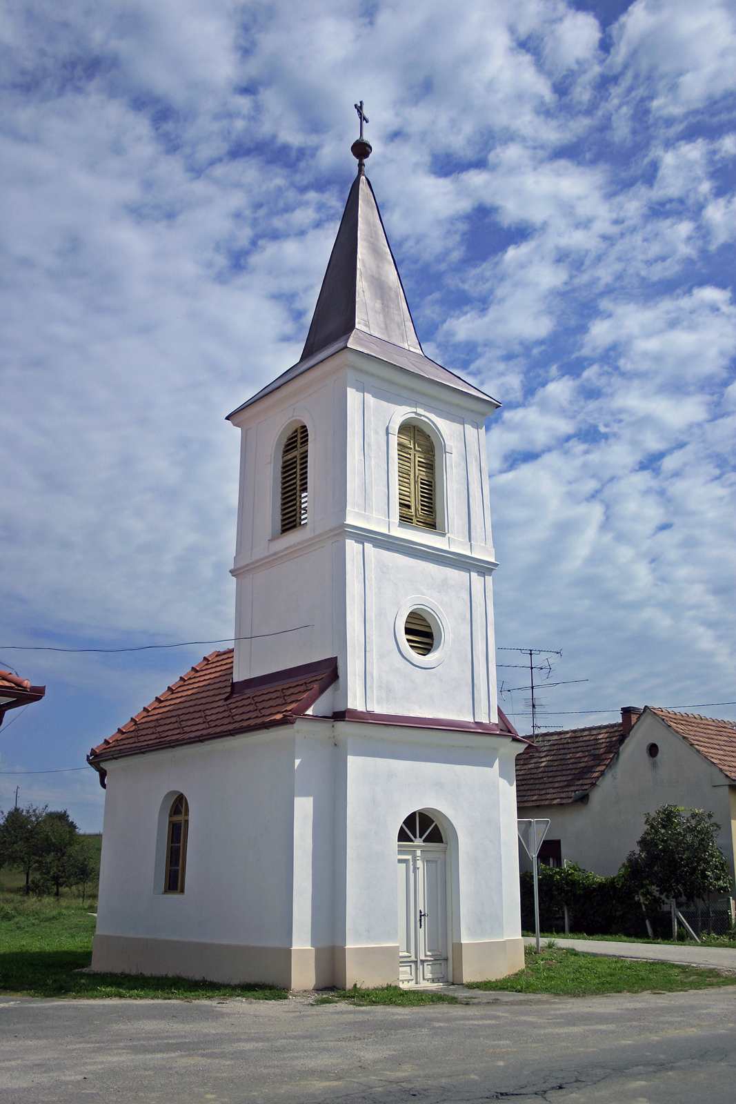 Brezovci - Vaška kapela